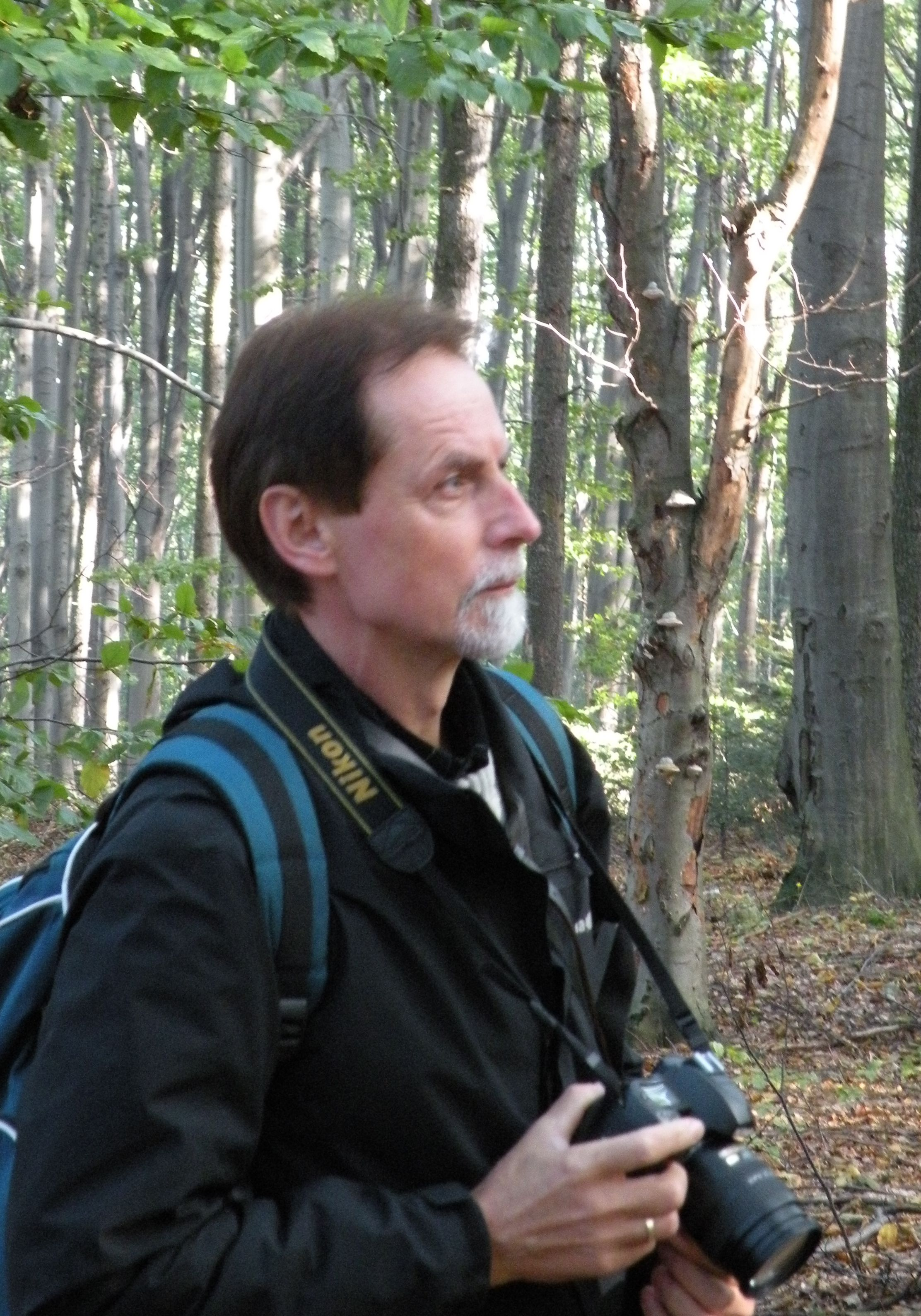 Prof. Jerzy Gutowski na zjeździe PTE w Górach Świętokrzyskich